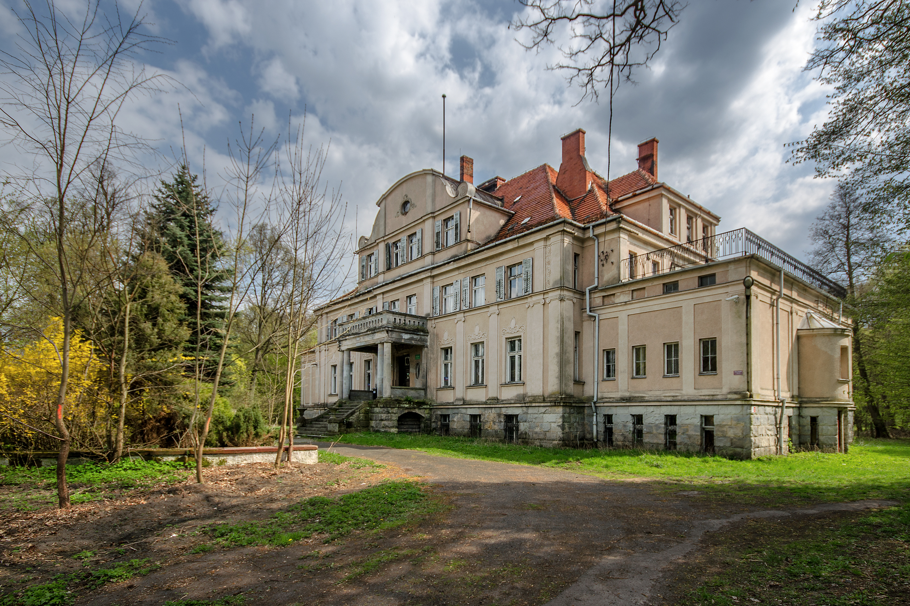 Krzeczyn Wielki 43, pałac, kon. XVII, 1866-1872, XX